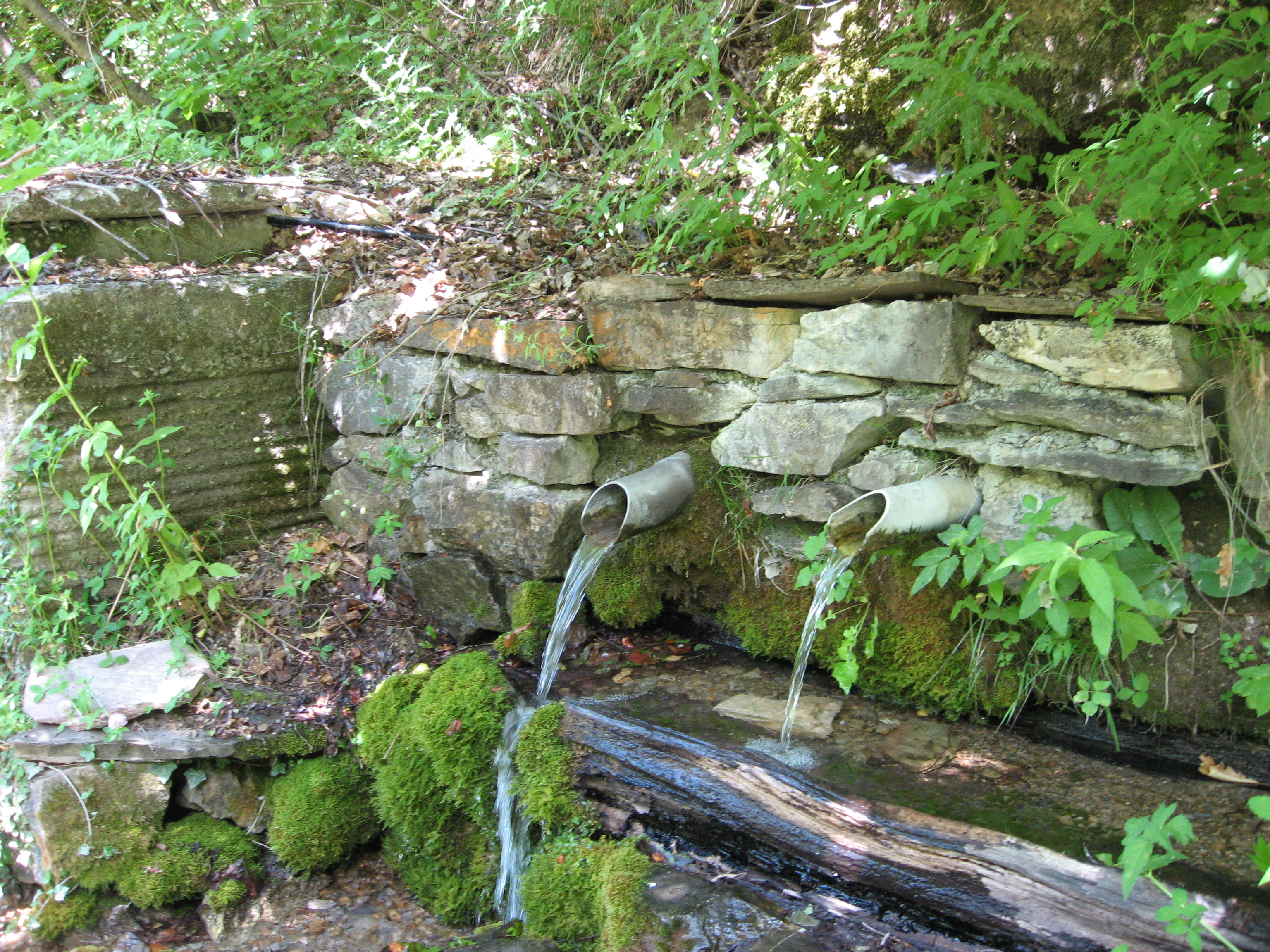 Чешма Бука - Горно Мелничани